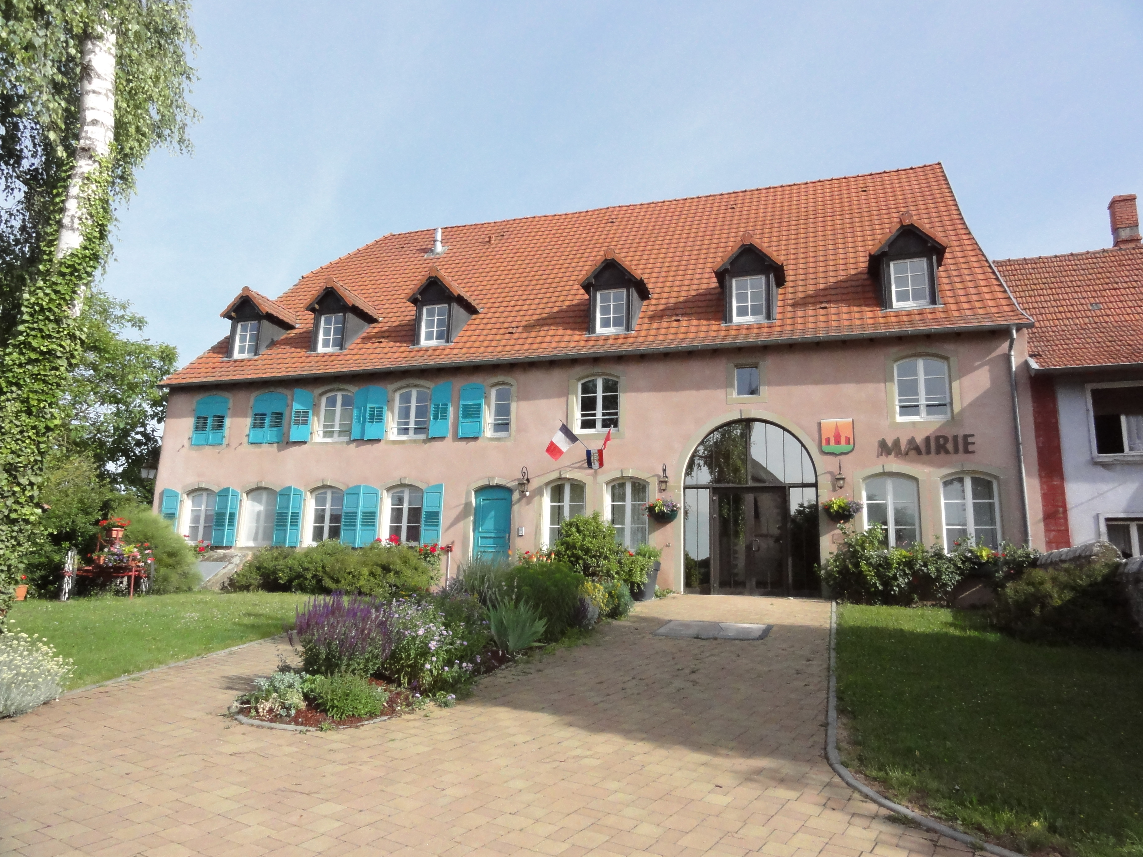 Haut-Clocher (Moselle) mairie